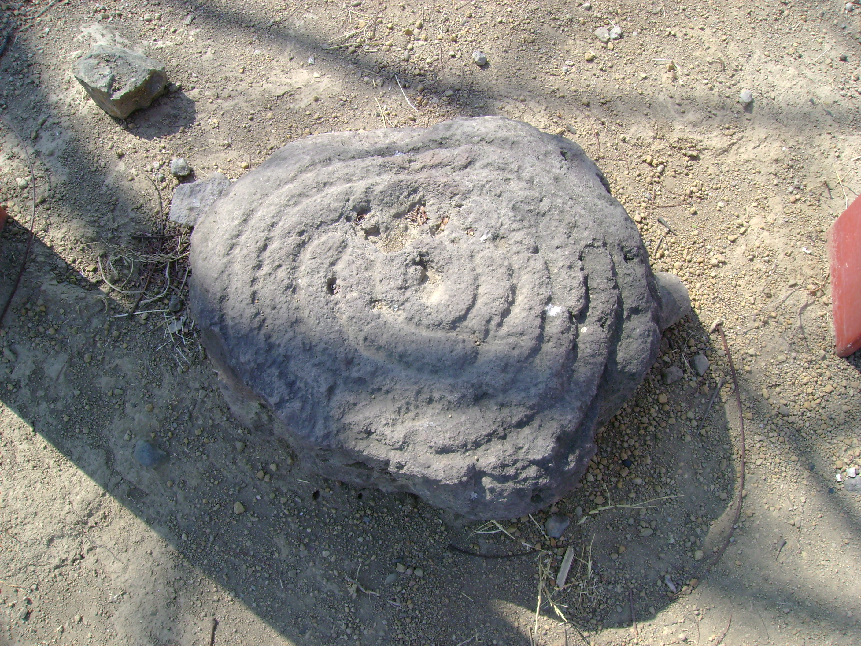 Piedra tallada en la z.a de la Campana en México